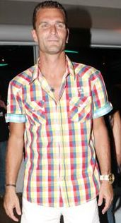 לירן שטראובר